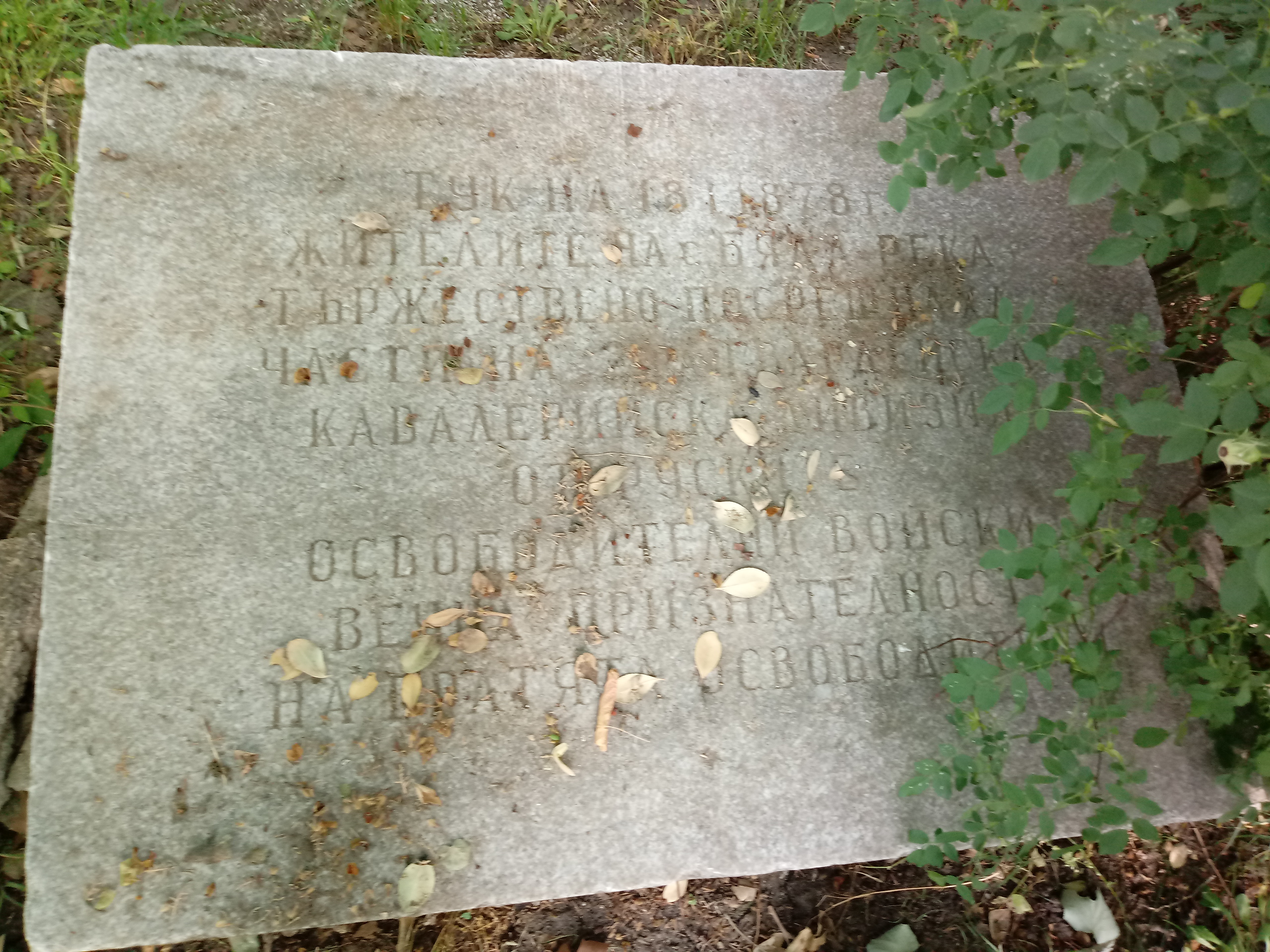 Паметна плоча за посрещането на руската армия от жителите на с. Бяла река през 1878 г.